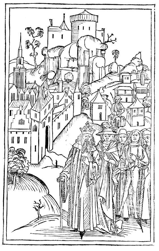 Schwäbische Chronik. 8v